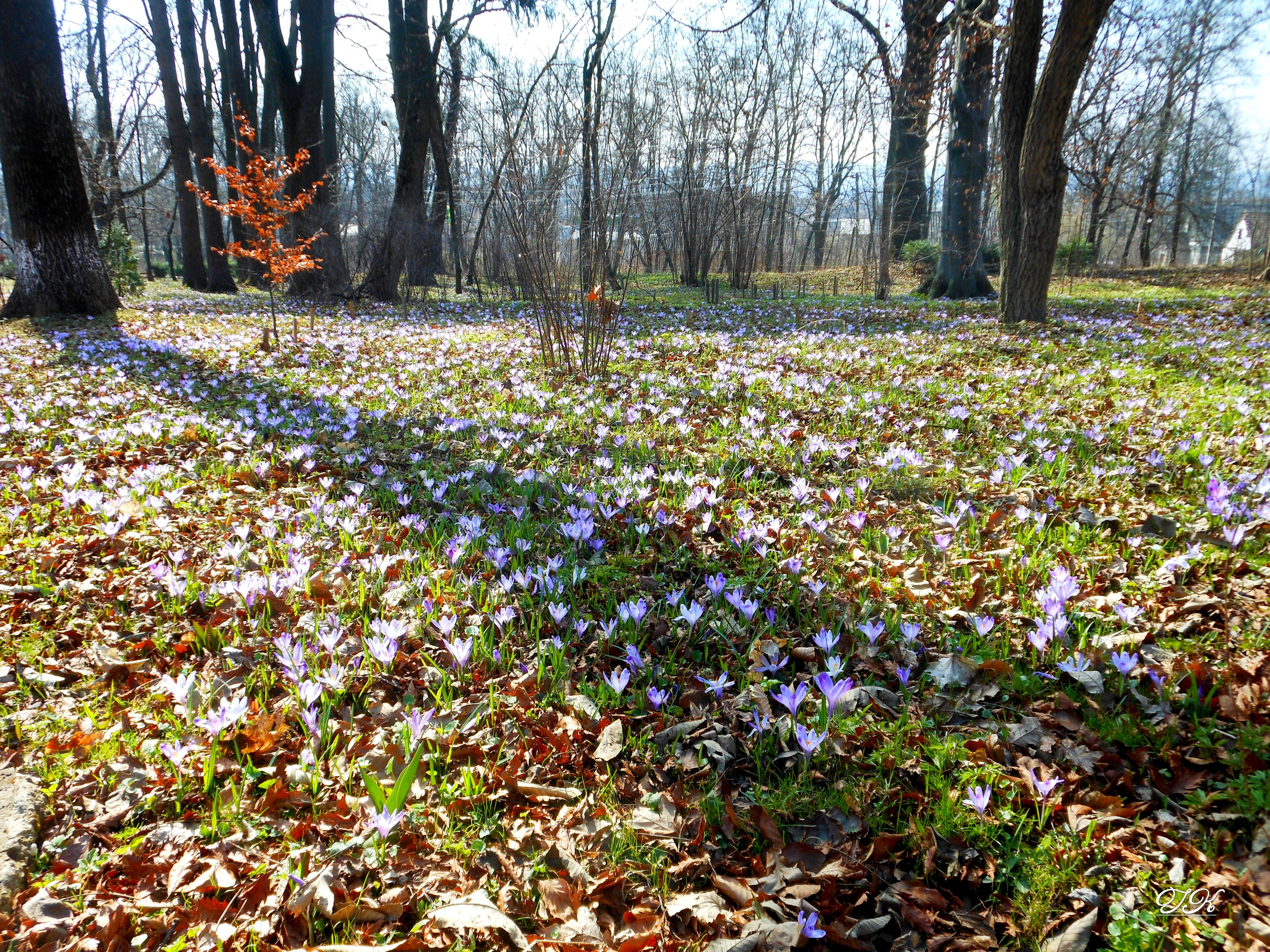 Сторожинецький, Сторожинецький район, м. Сторожинець